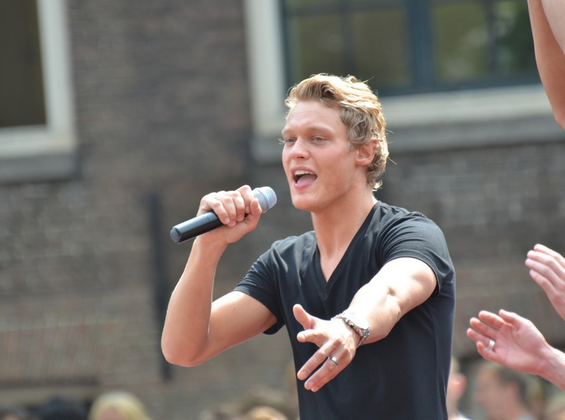 Ferry Doedens tijdens de Canal Parade in Amsterdam.